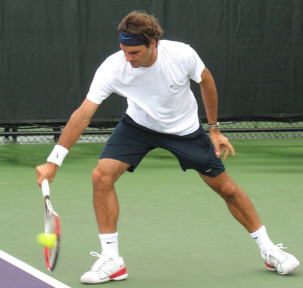 Roger Federer, Miami, Florida, 2007